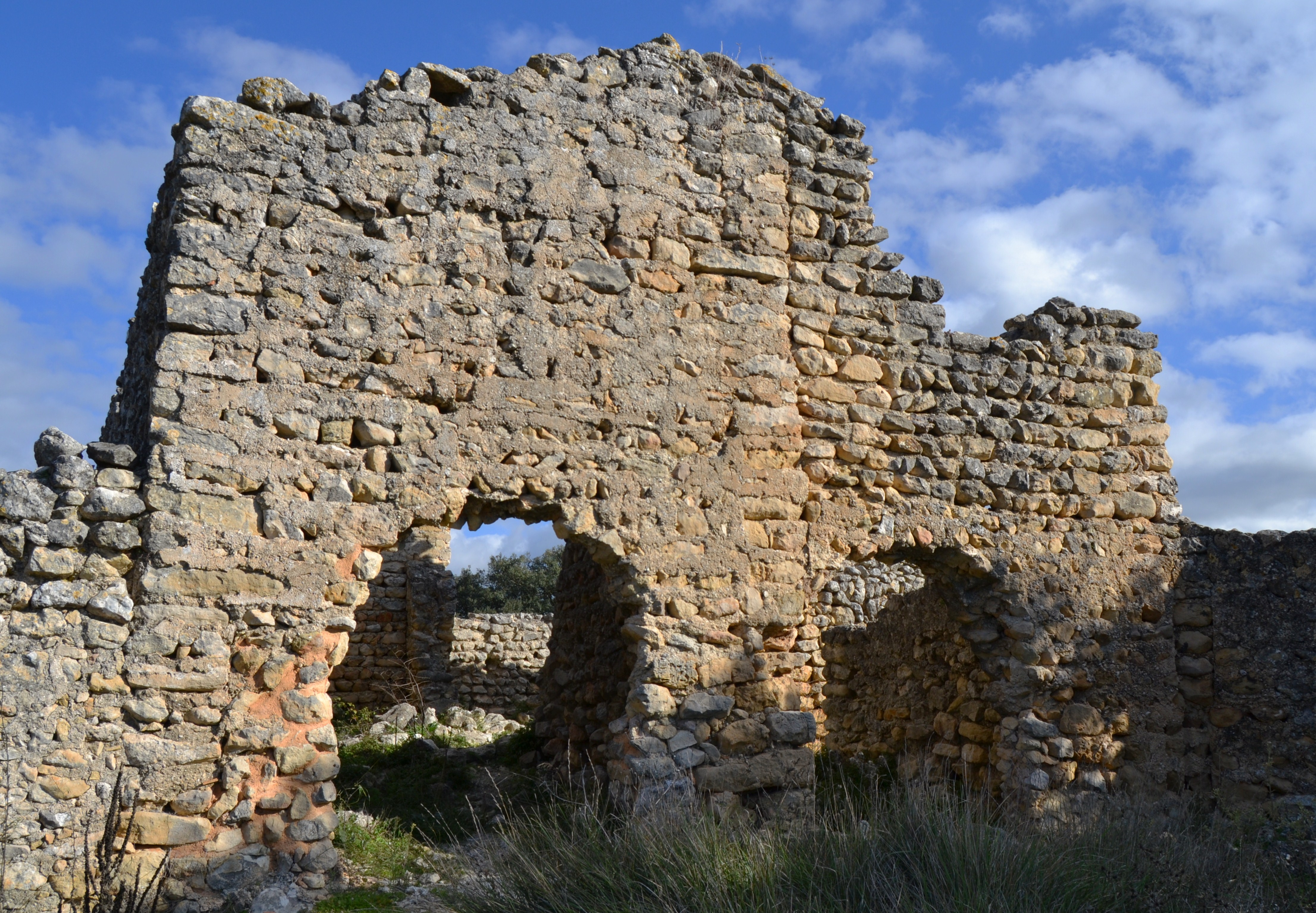 Despoblat morisc de l'Atzuvieta (la Vall d'Alcalà), dos arcs.